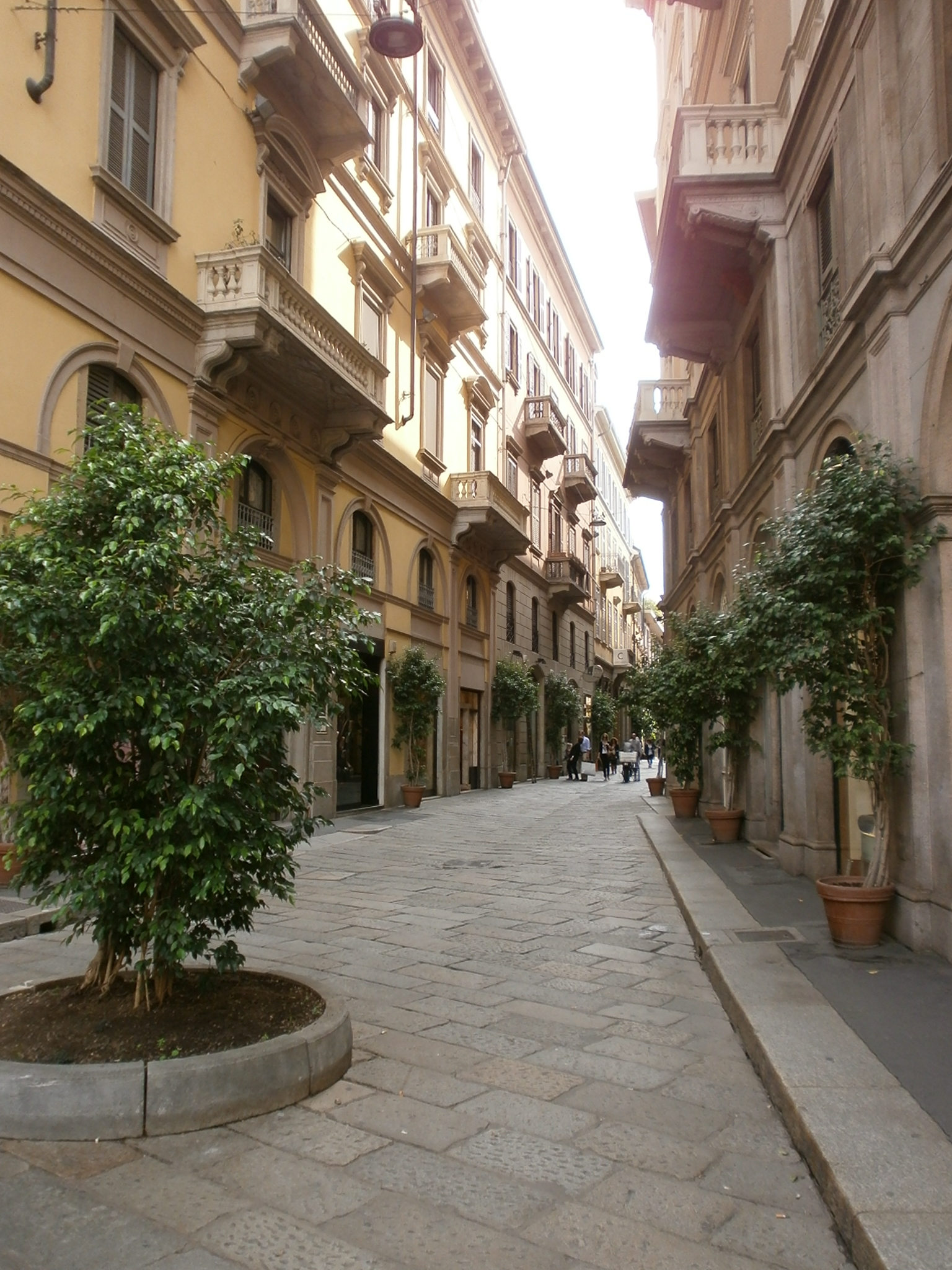 Via della Spiga - Milano - Quadrilatero della moda